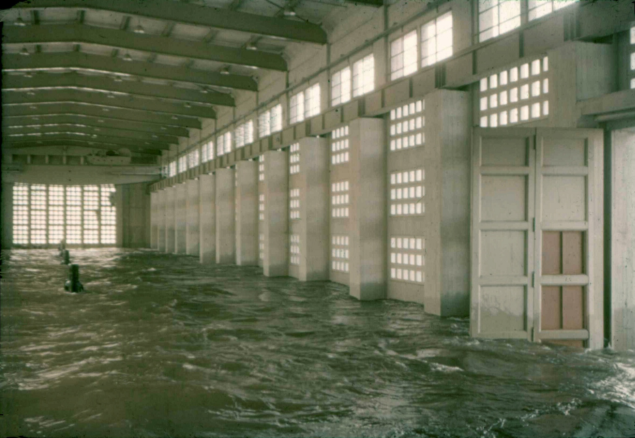 Rincón del Bonete Creciente de 1959 Vista Sala de Maquinas